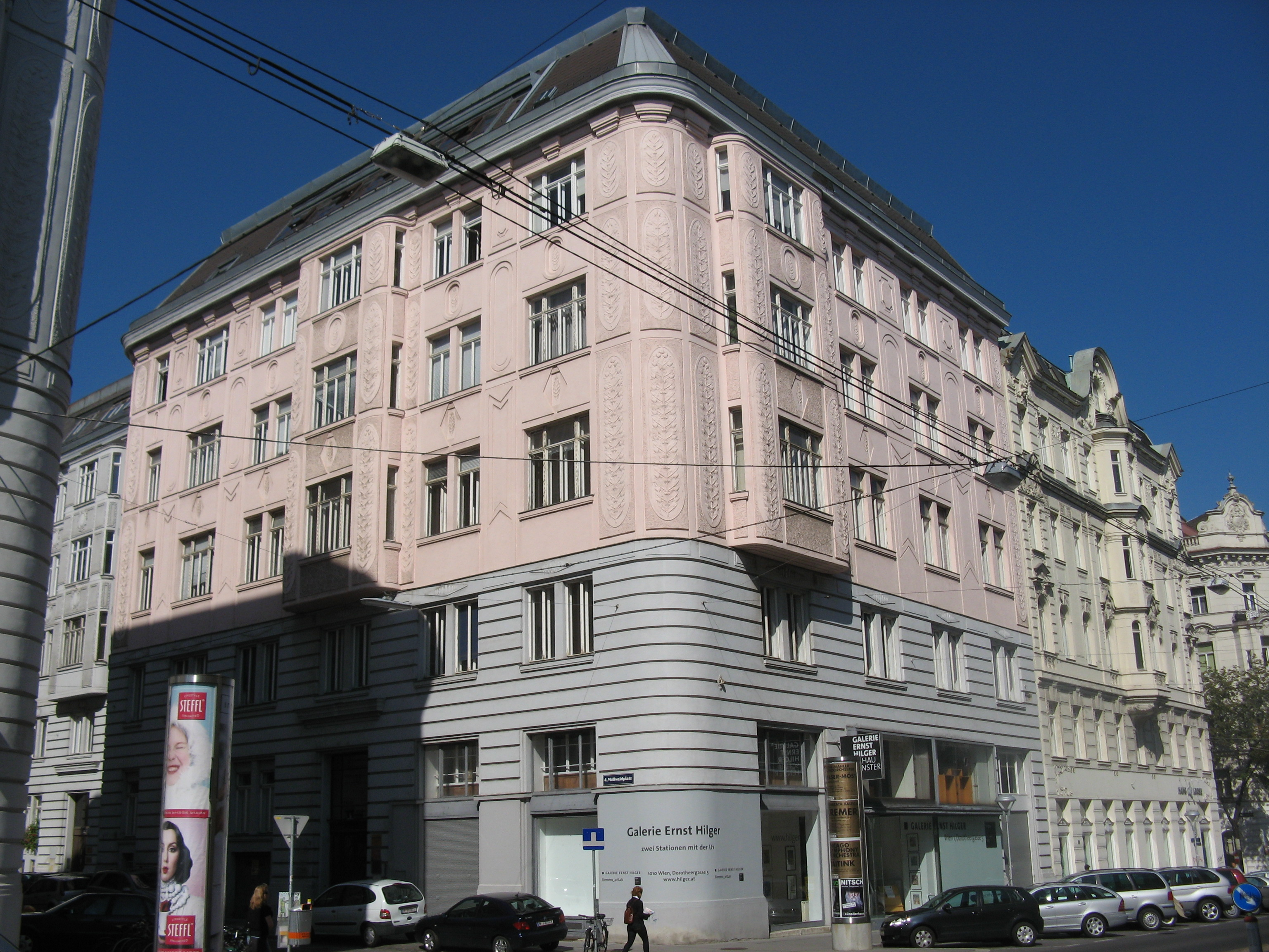 Haus (1906-07) von Carl Riess, Favoritenstraße 30, Wien-Wieden